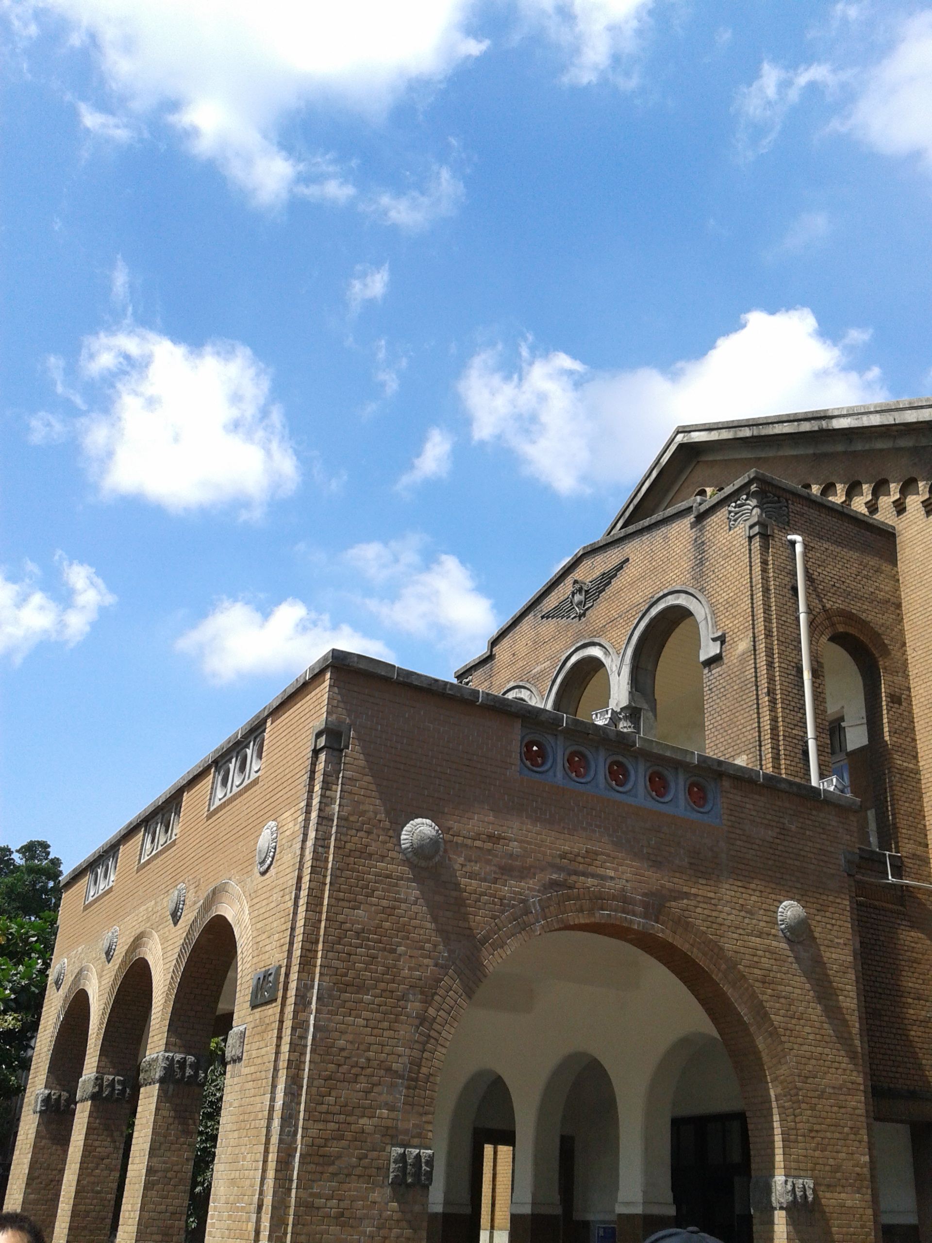 中文（台灣）: 台大文學院